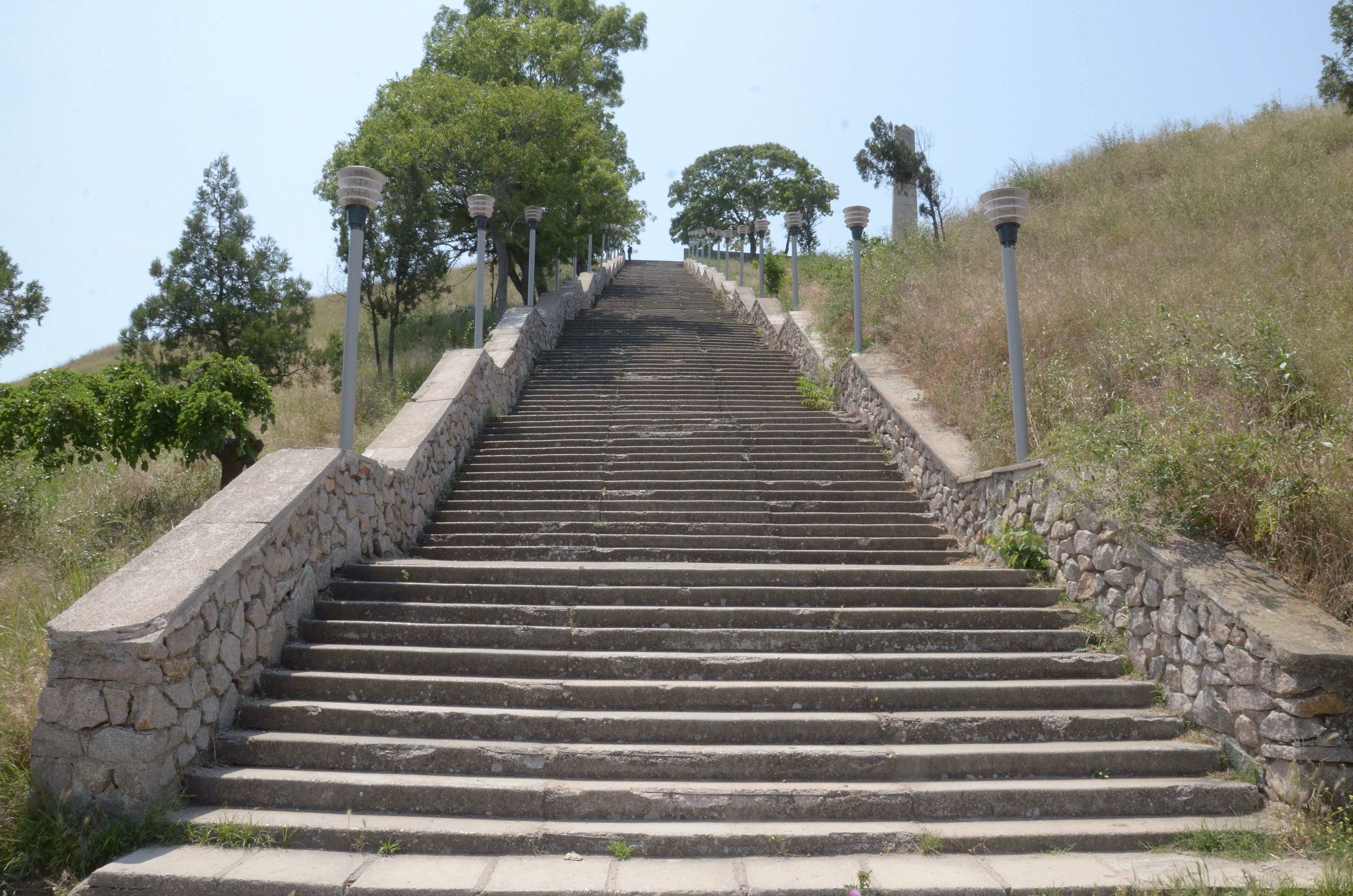 Керчь